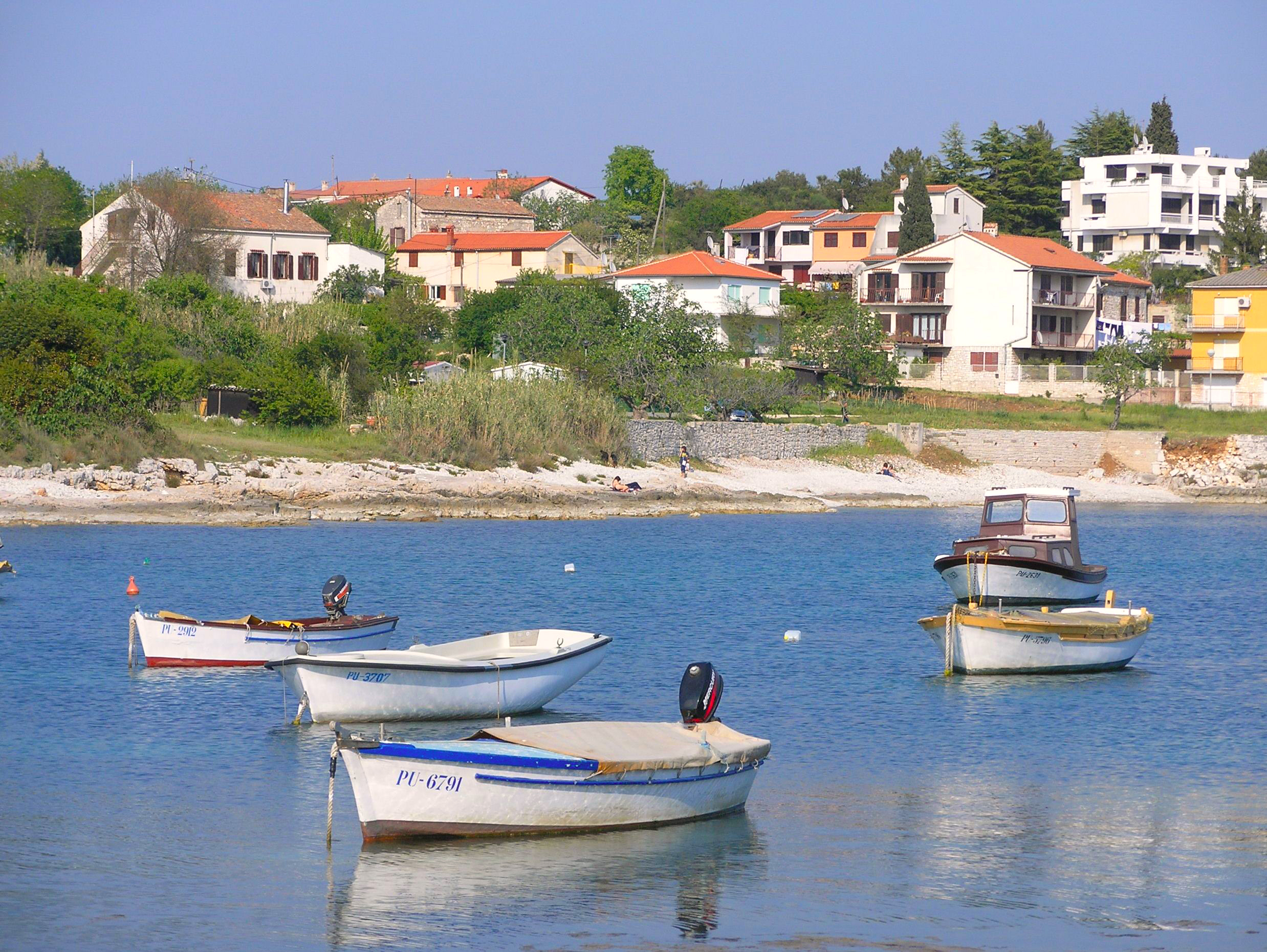 Coastline in Pula, Croatia